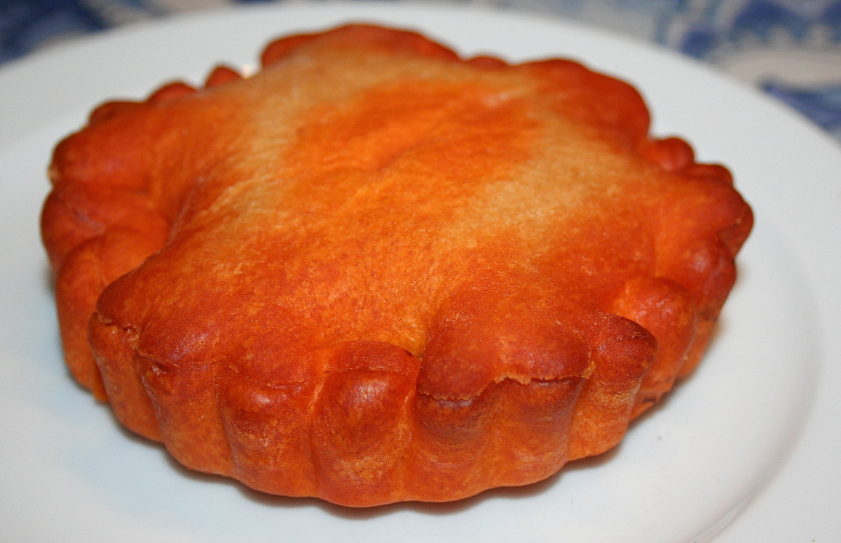 Tielle sétoise vue de profil.